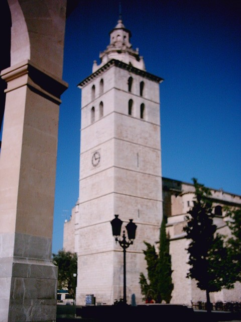 Església parroquial de Santa Maria la Major, a Inca (Mallorca)